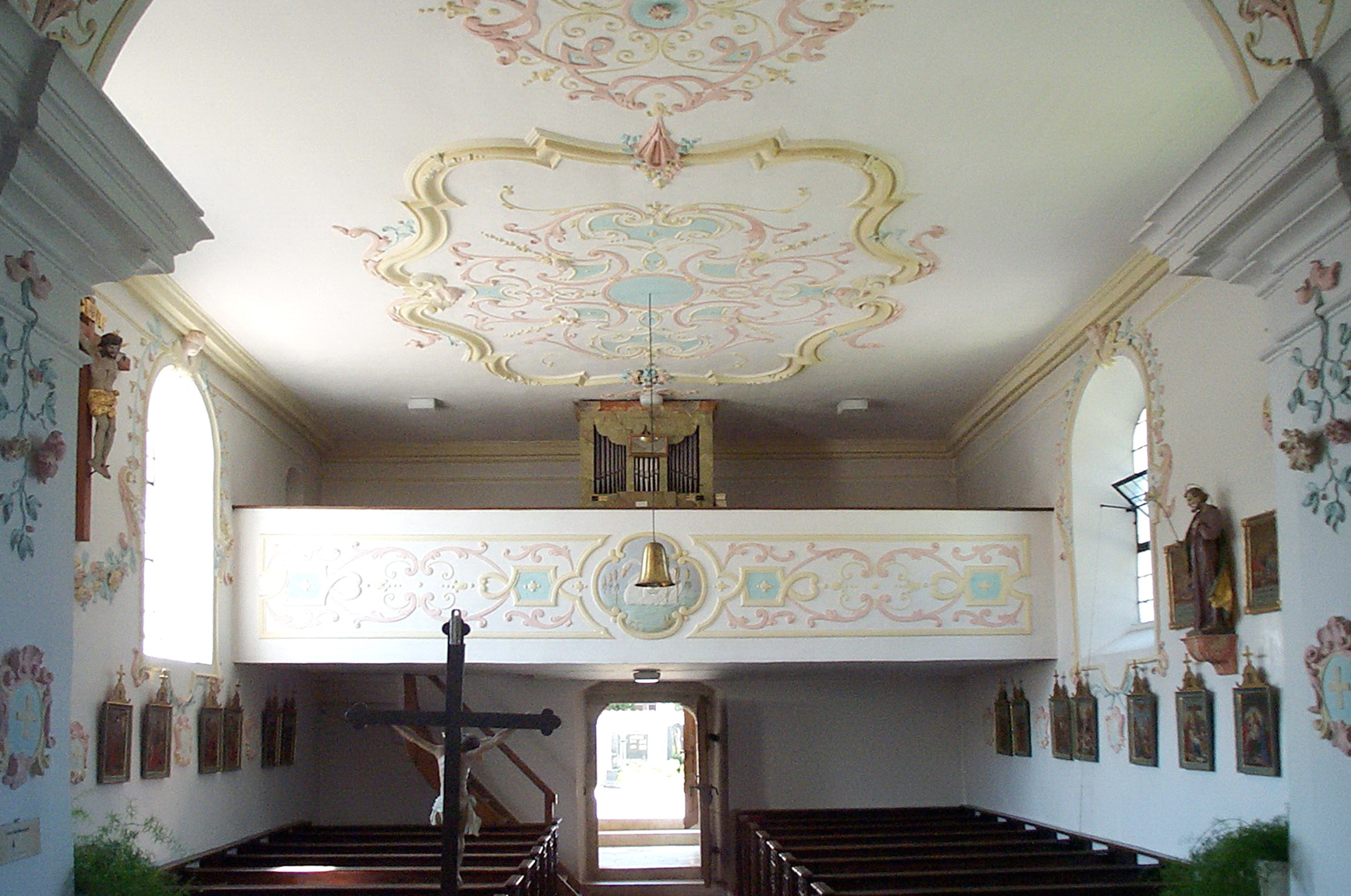 Herrngiesdorf, Bernhardstraße 23-25. Katholische Kirche St. Martin. Das Langhaus mit flacher Stuckdecke, Kranzgesims und Rahmenstuck. Westempore mit gerader Brüstung und kleiner Orgel.